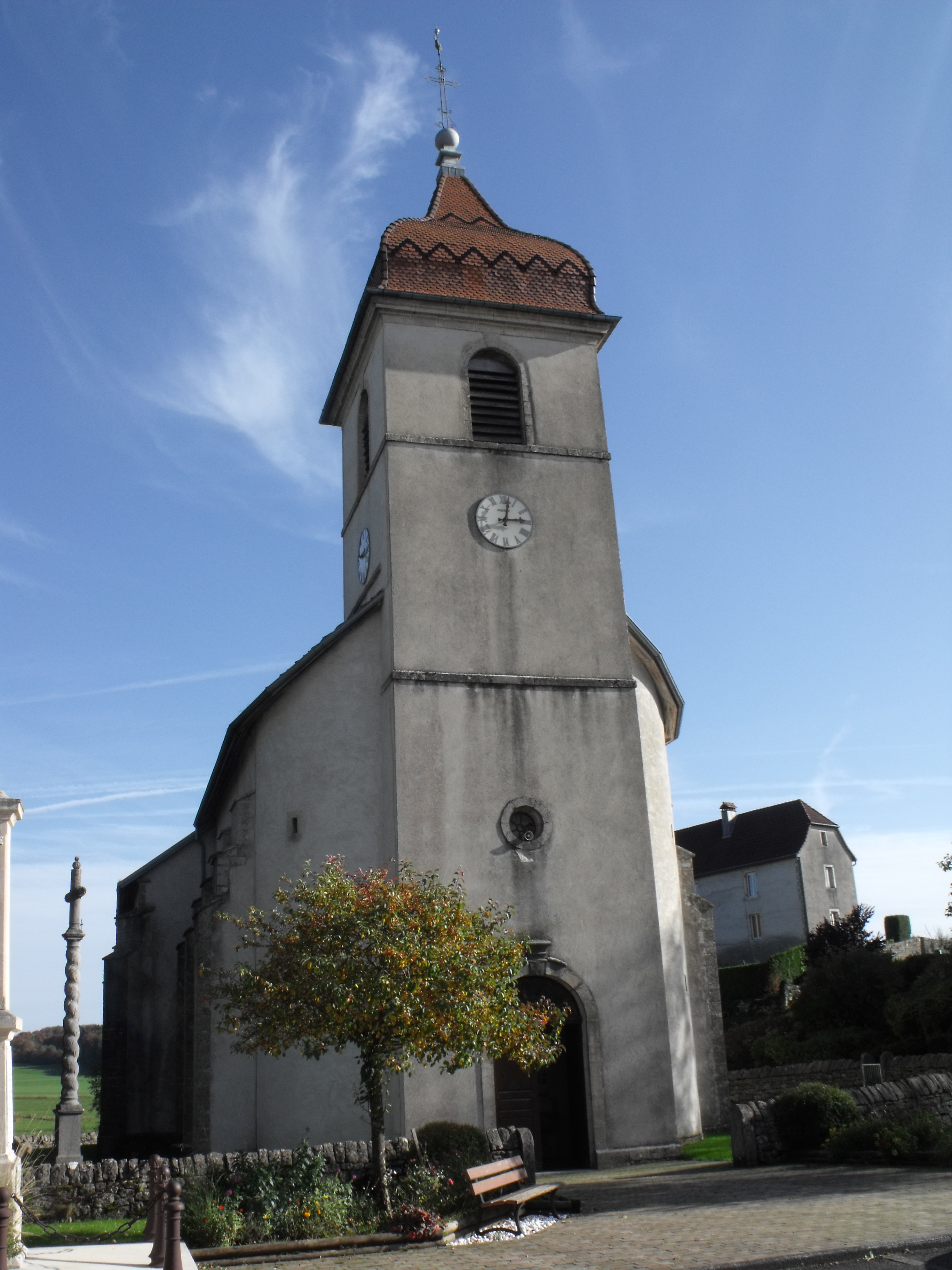 Eglise de Chamesol (Doubs, France)